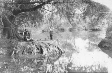 El Nacimiento